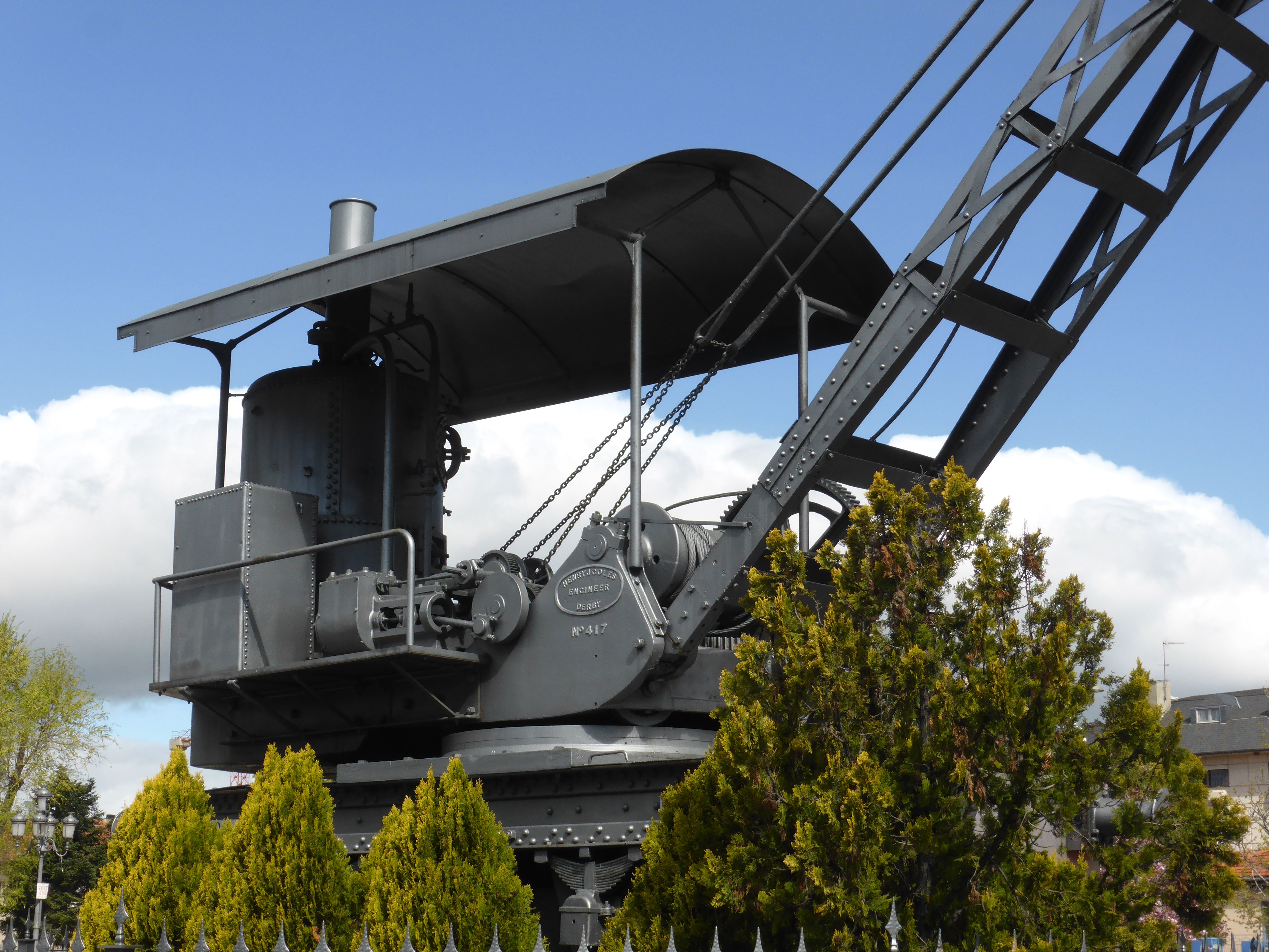 En la plaza de la estación de Villalba (municipio de Collado Villalba), provincia de Madrid, se conserva esta antigua grúa de vapor fabricada en Inglaterra por "Henry J. Coles", en Derby, con el número de construcción 417, hacia el año 1906. Es de ancho ibérico y perteneció a la antigua compañía ferroviaria "Andaluces", y a partir de 1941 a Renfe (matrícula GM 106). Se conservaba en el exterior del "Museo Nacional Ferroviario" (Madrid-Delicias). Fue cedida para un pedestal. Es una pieza única, de las pocas grúas de vapor ferroviarias conservadas en España.